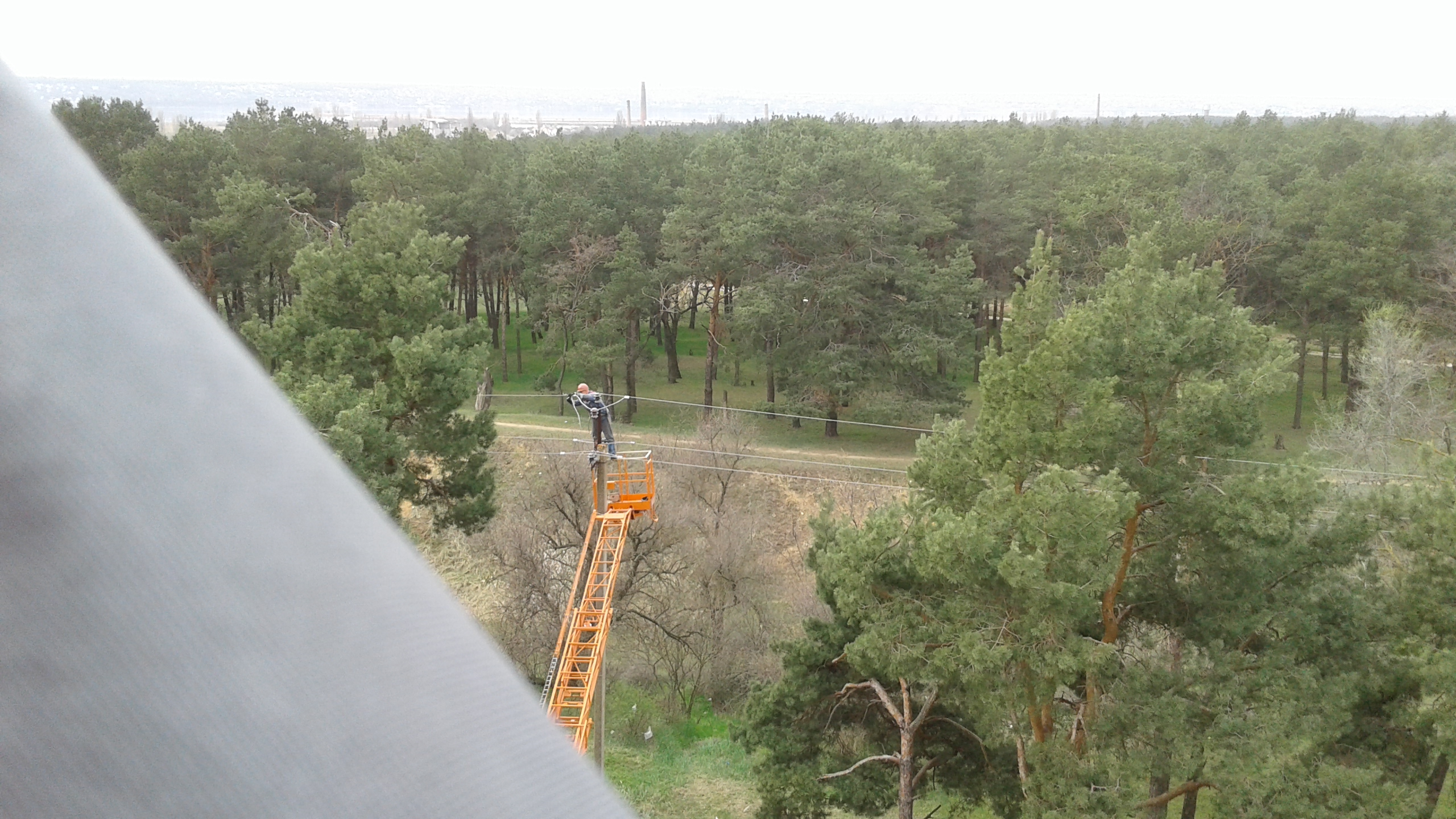 Монтажні роботи на ЛЕП